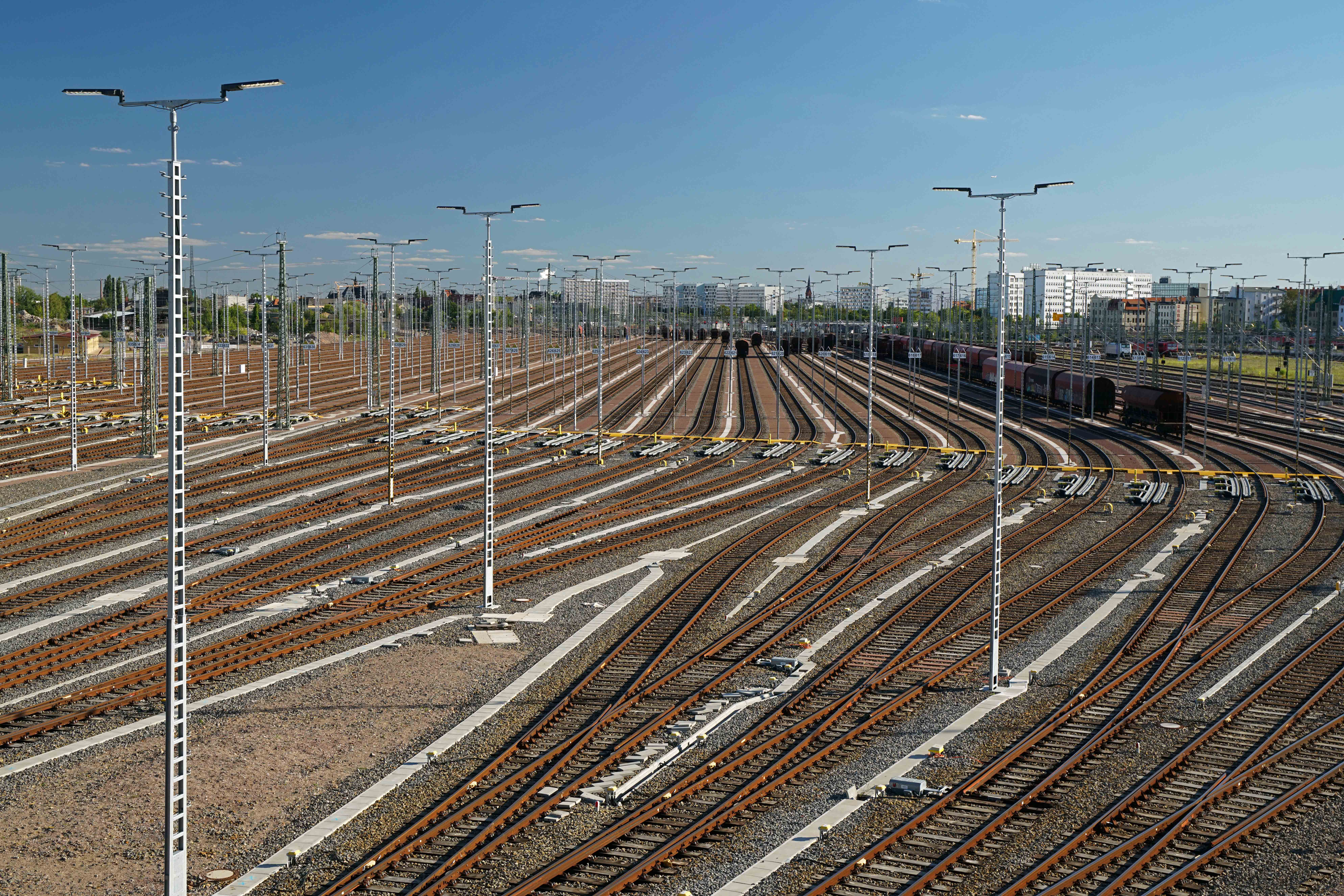 Der neue Güterbahnhof von Halle, der wichtigste in ganz Mitteldeutschland, seit heute nach jahrelangem Totalumbau in Betrieb. Gesamtkosten ca. 146 Mio. €€, 36 Richtungsgleise, 800 Lichtmasten mit LED-Strahlern. ca. 100 Eisenbahner im 5 Schichtbetrieb. Zugbildungsanlage ZBA. Nord, Südblick von der Berliner Brücke.